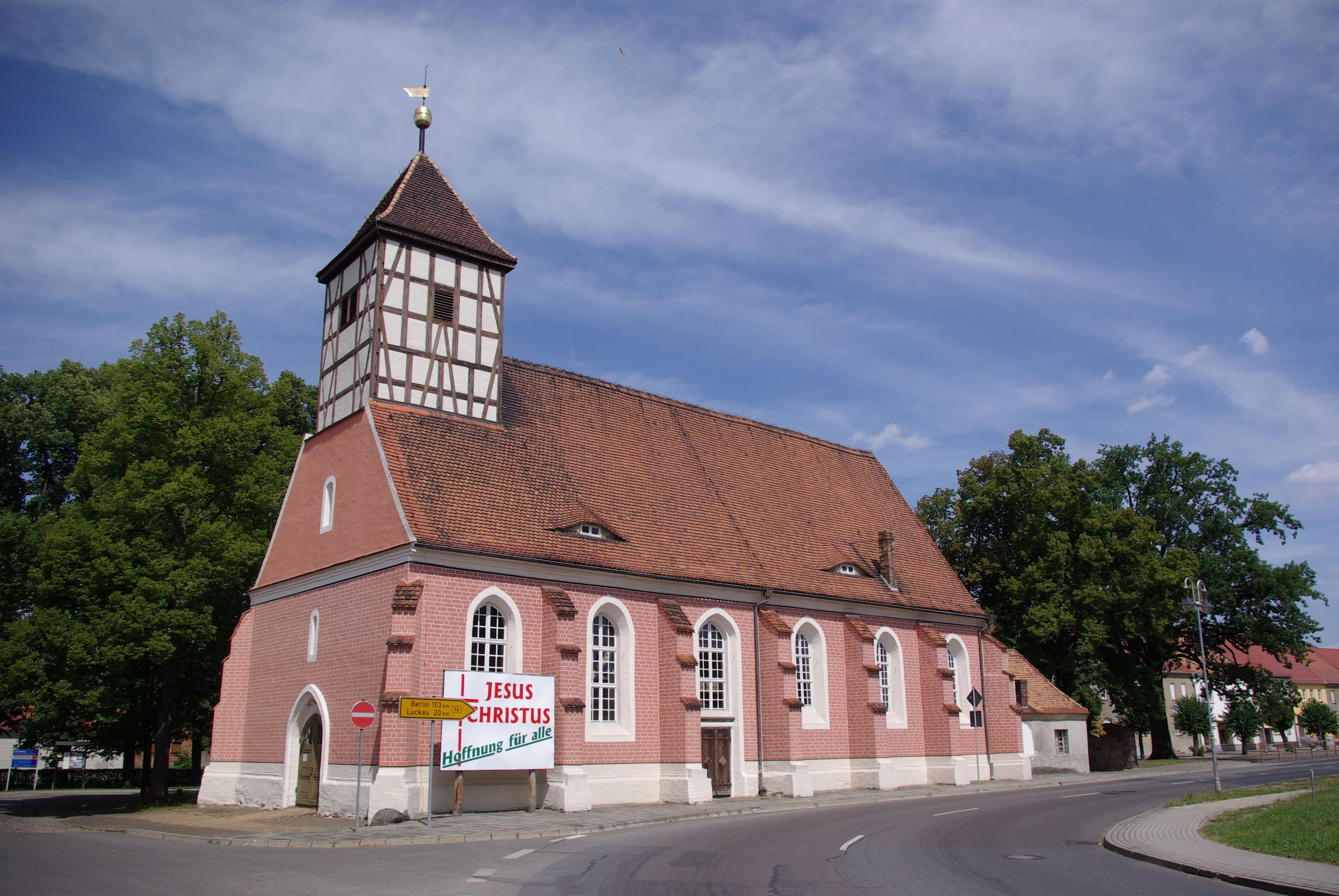 Sonnewalde in Brandenburg. Die Kirche stammt wahrscheinlich aus dem 15. Jahrhundert. Die Kirche steht unter Denkmalschutz.